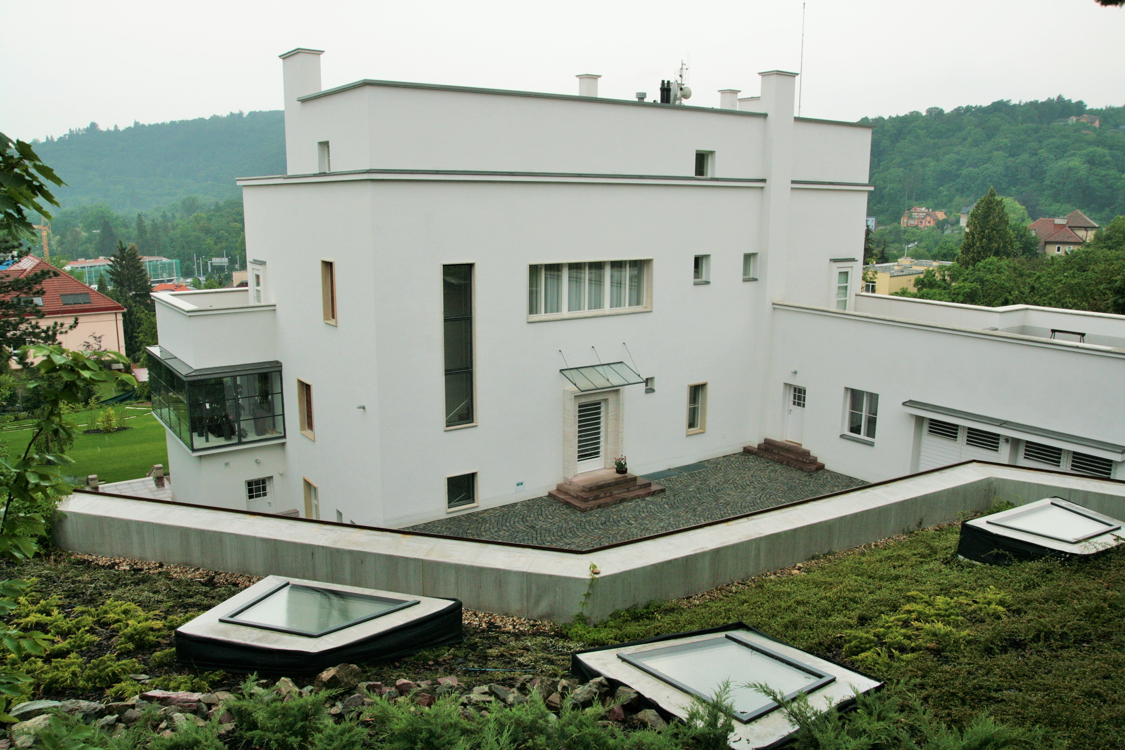 Münzova vila krátce po generální rekonstrukci (znovupostavení) v roce 2015.